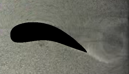 Nach links beschleunigtes Profil mit Anfahrwirbel rechts